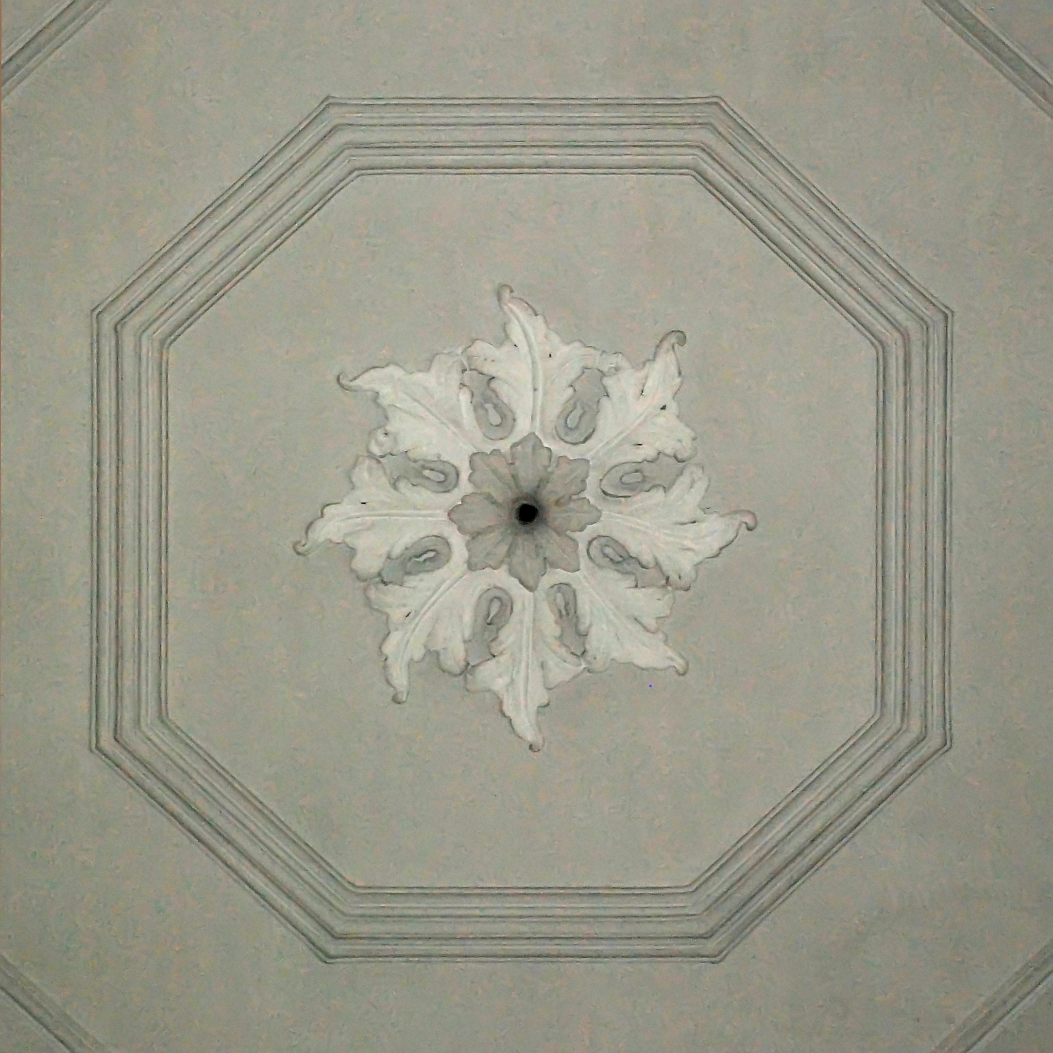 Belgique - Brabant wallon - Église de Court-Saint-Étienne